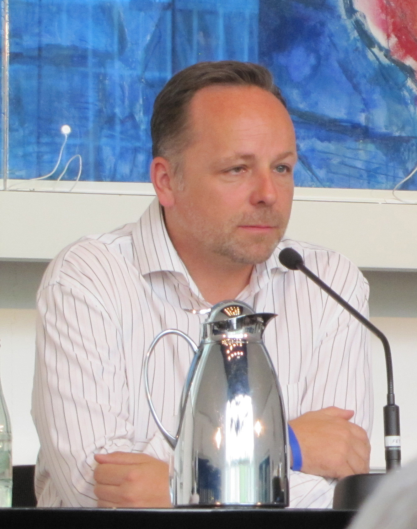 Daniel Röder, bei den 47. Römerberggesprächen, Thema:Last Exit nach dem Brexit Ist Europa noch zu retten?", im Mai 2019 im Chagall-Saal der Städtischen Bühnen in Frankfurt am Main.